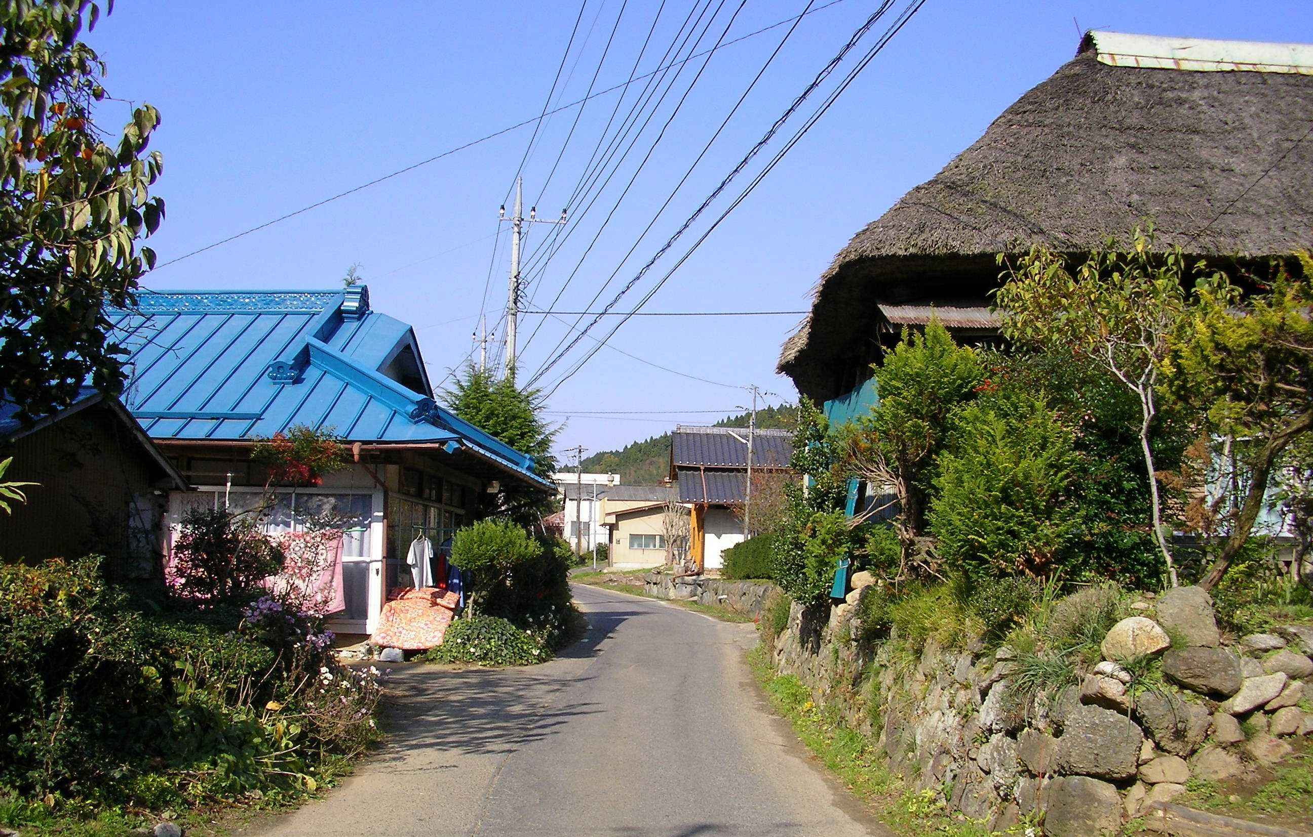 国道461号、茨城県常陸太田市下高倉町付近。幅員は自動車1台分で、山間の集落を抜けている。2005年11月